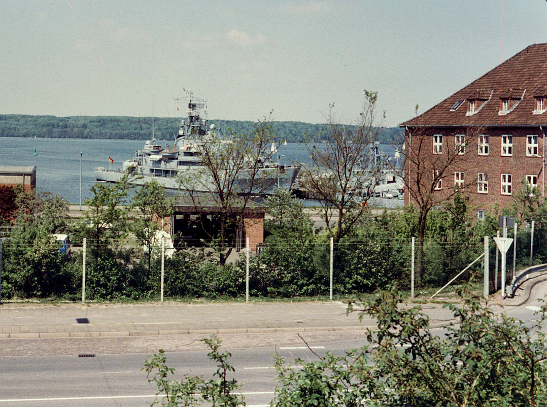 Marinehafen heut Sonwik, Kriegsschiffe vor der Bonte-Kaserne (Mürwik-Stützpunkt 6 Mai 1990; Die Bonte-Kaserne ist der Backsteinbau rechts)